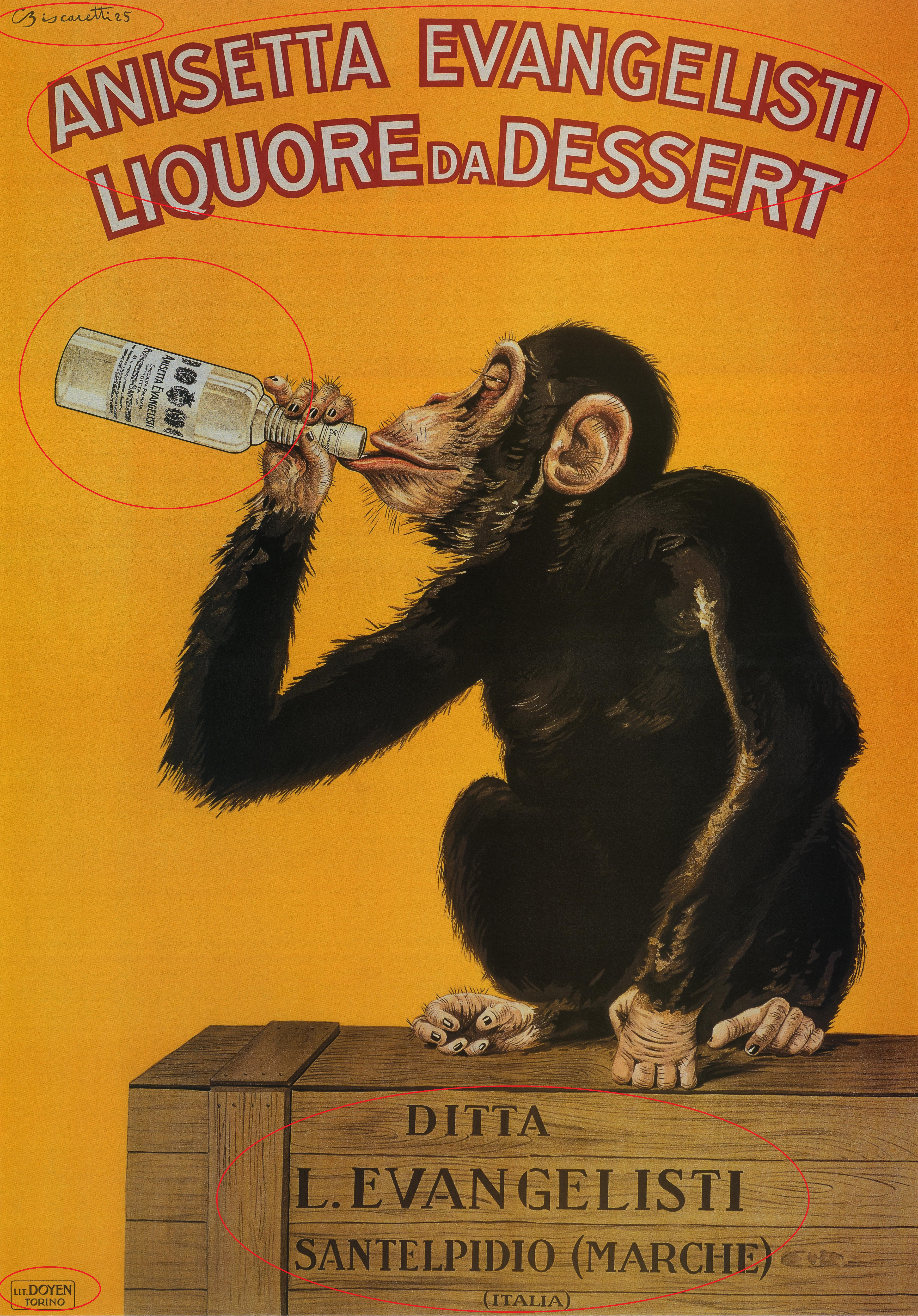 Scansione Litografia Anisetta Evangelisti opera di Carlo Biscaretti di Ruffia 1925